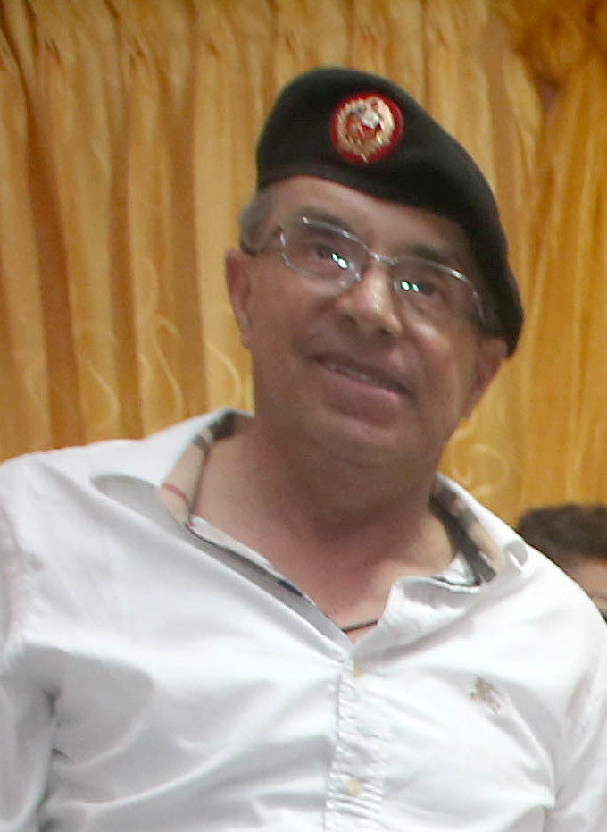 Edwin Donayre Gotzch en 2016.